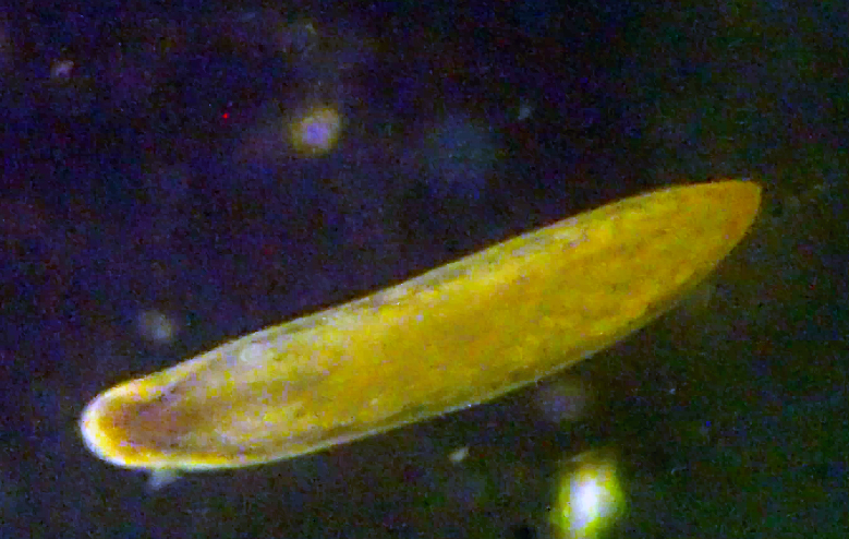 2019年8月31日、愛知県西尾市の水田で採集した。